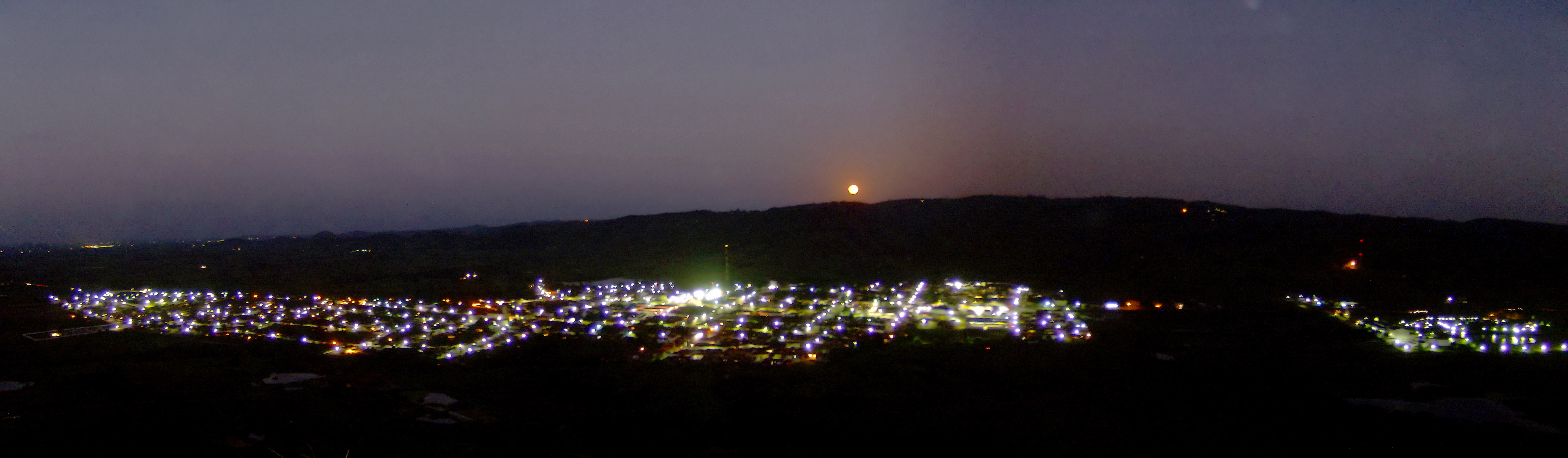 Vista panorâmica de Belém da Paraíba